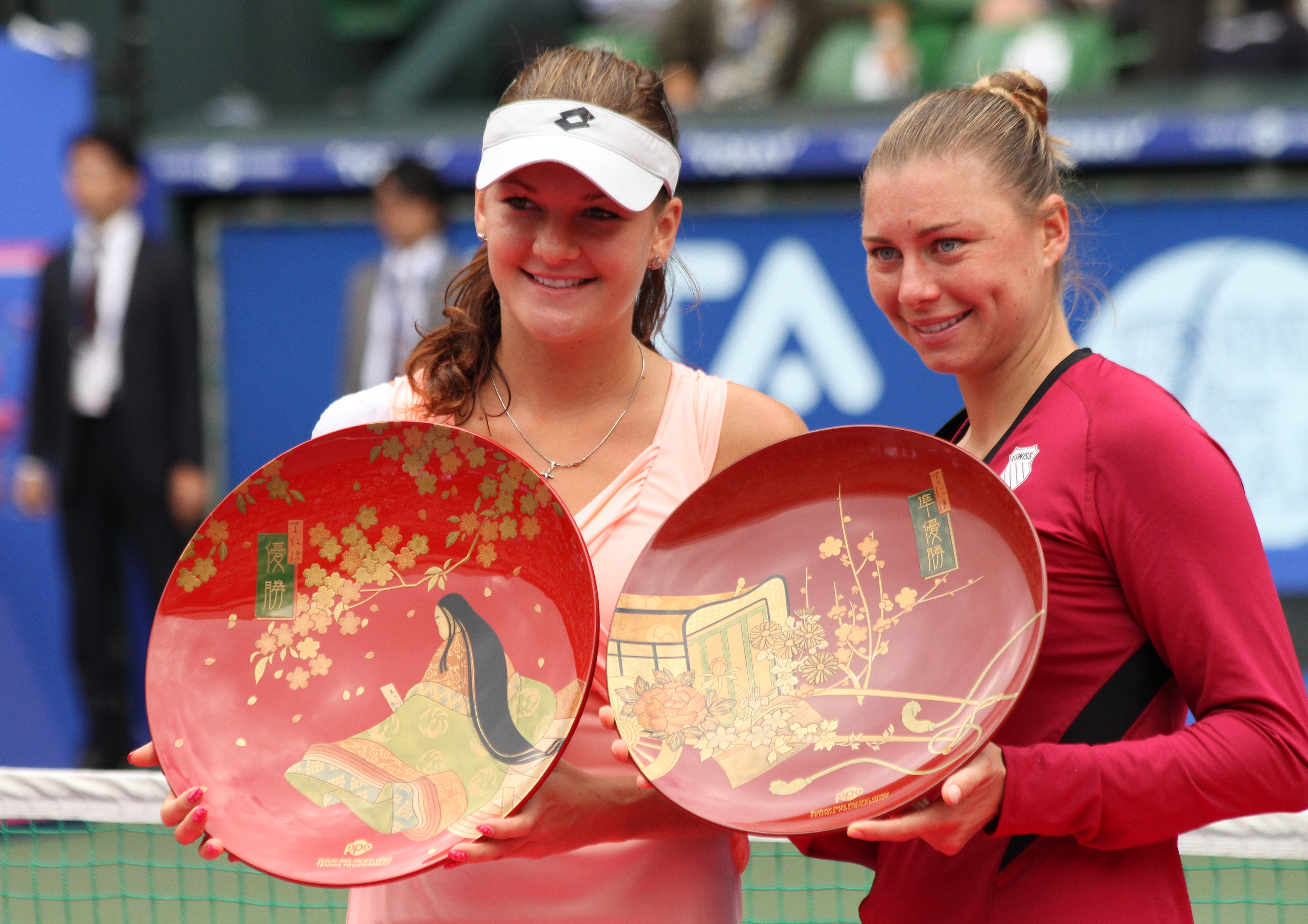 Agnieszka Radwańska and Vera Zvonareva at 2011 Pan Pacific Open